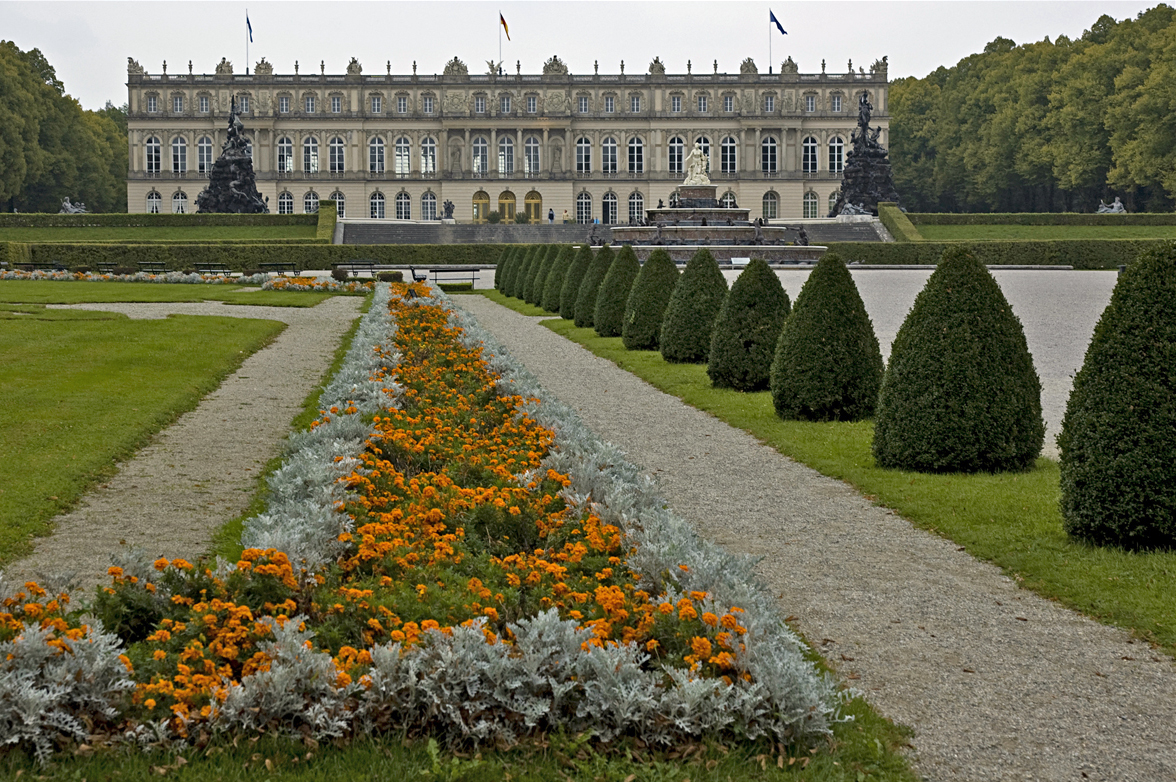 Neues Schloss Herrenchiemsee Panoramaansicht von Westen